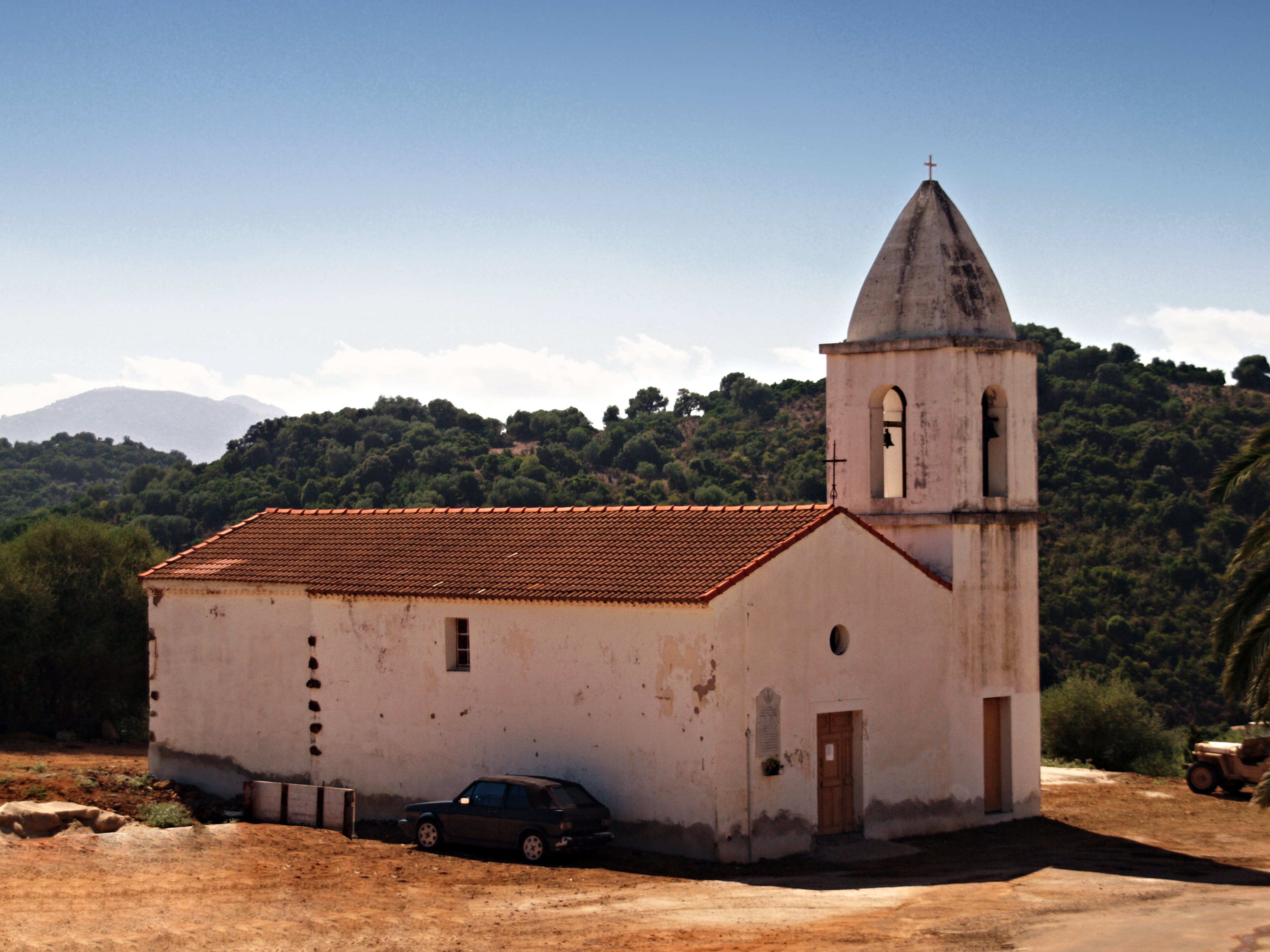 Osani, Ouest Corse (Corsica) - Église Saint-François du XIXe siècle